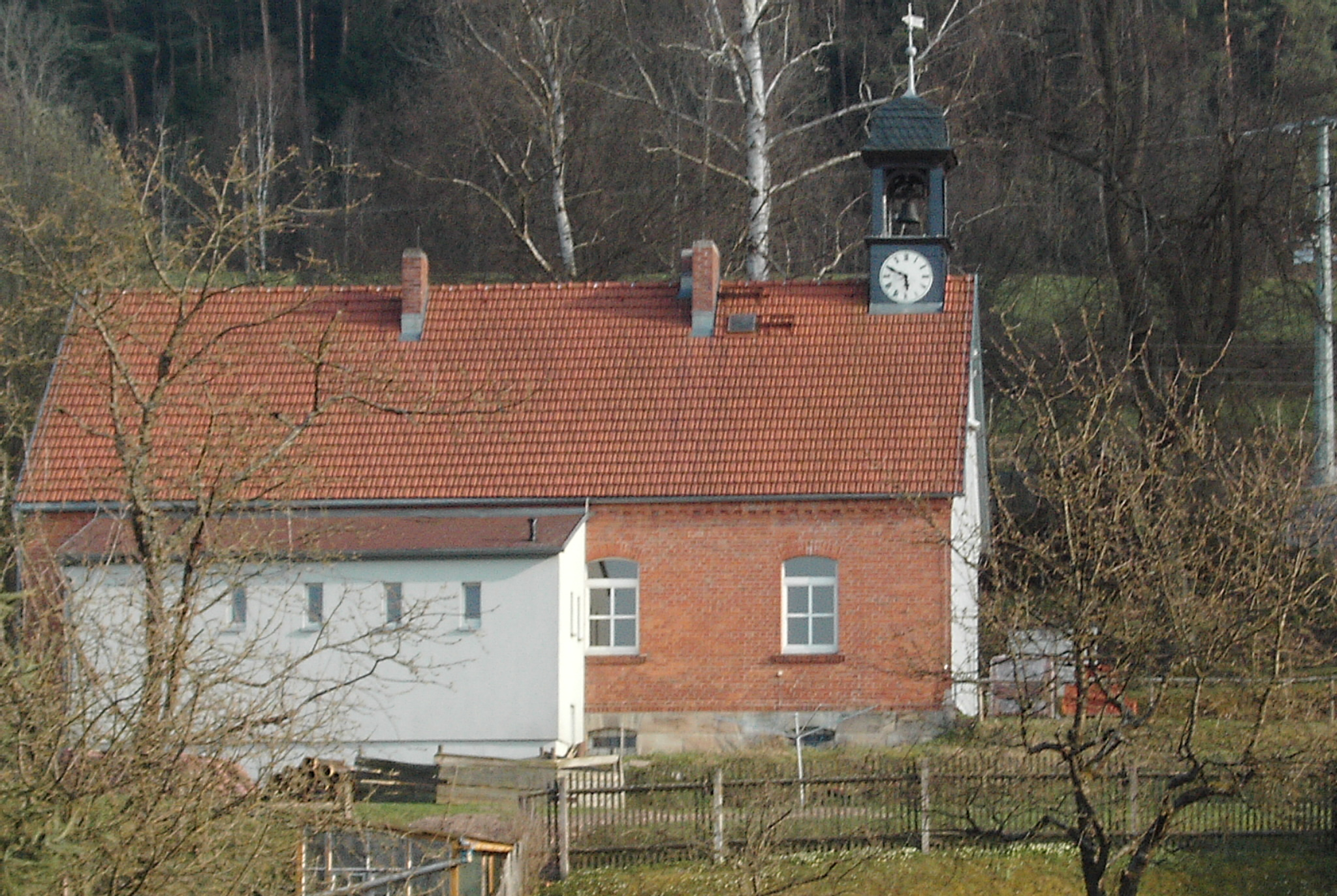 Vereinslokal Schleuseblick in Geisenhöhn